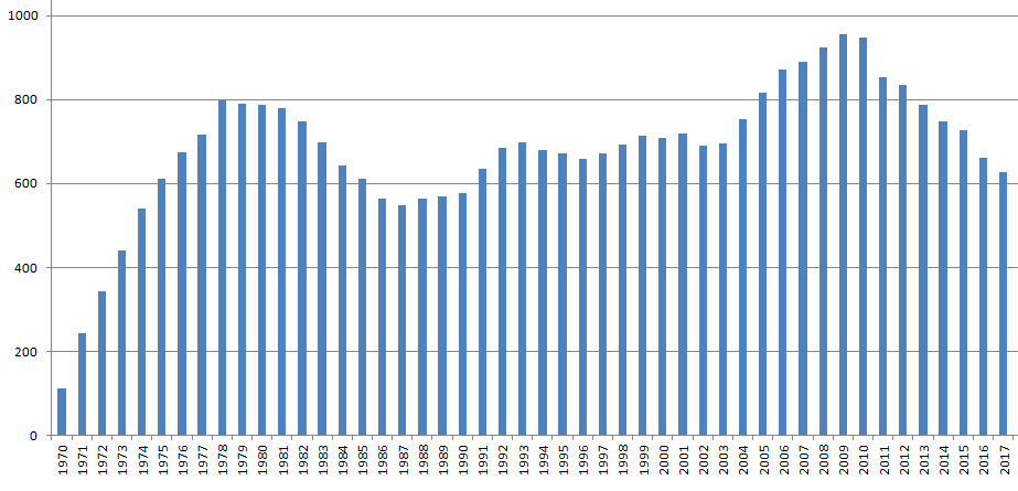 Schülerzahlen BNG 1970 bis 2017